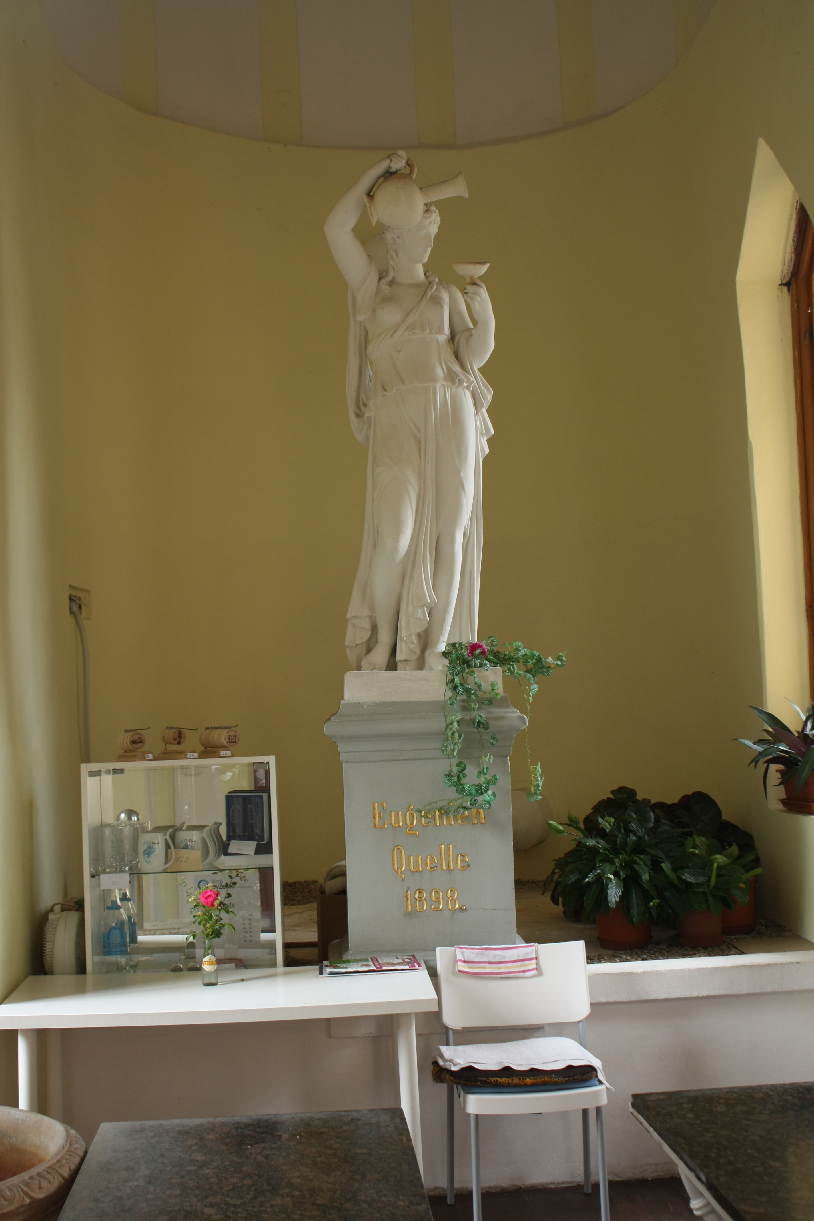 Eugenienquelle Klášterec nad Ohří (Klösterle an der Eger)